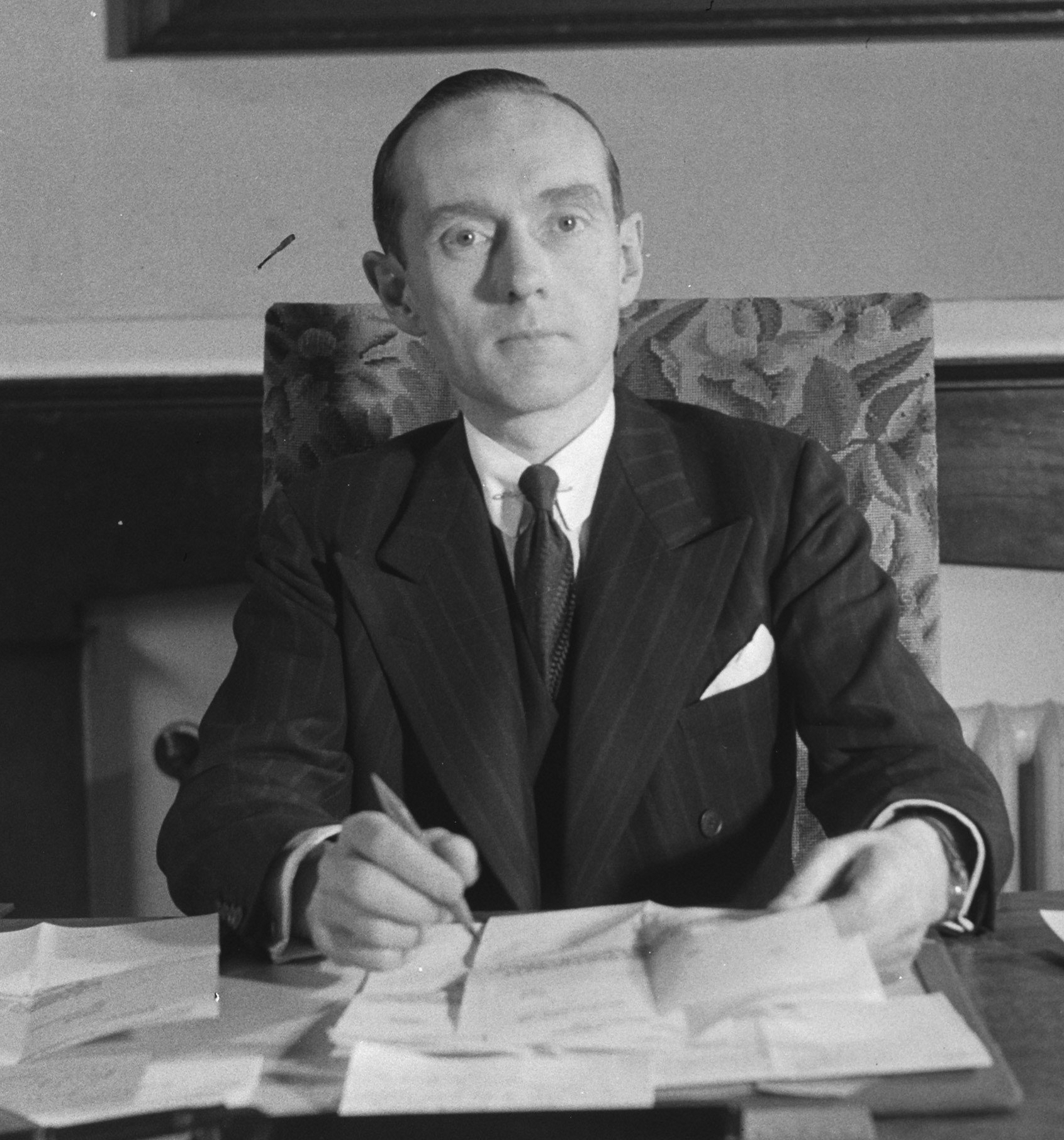 Minister Van Roijen